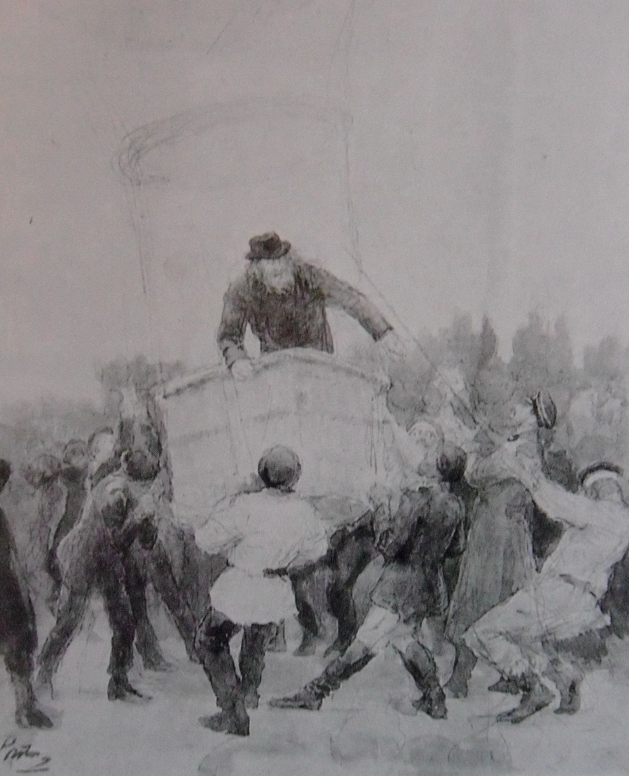 Менделеев Д.И. на воздушном шаре